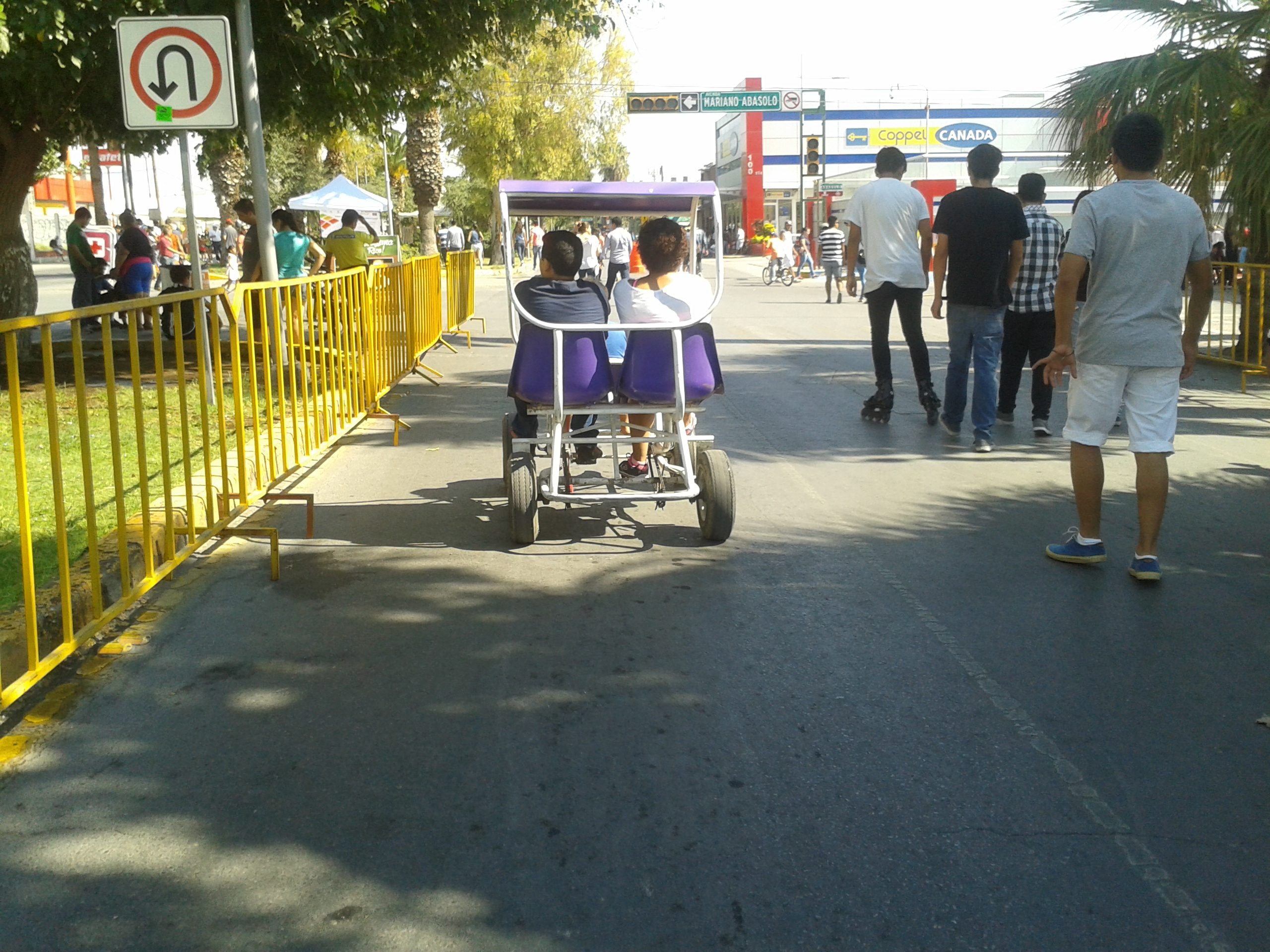 Cuatriciclos en el Paseo Colón